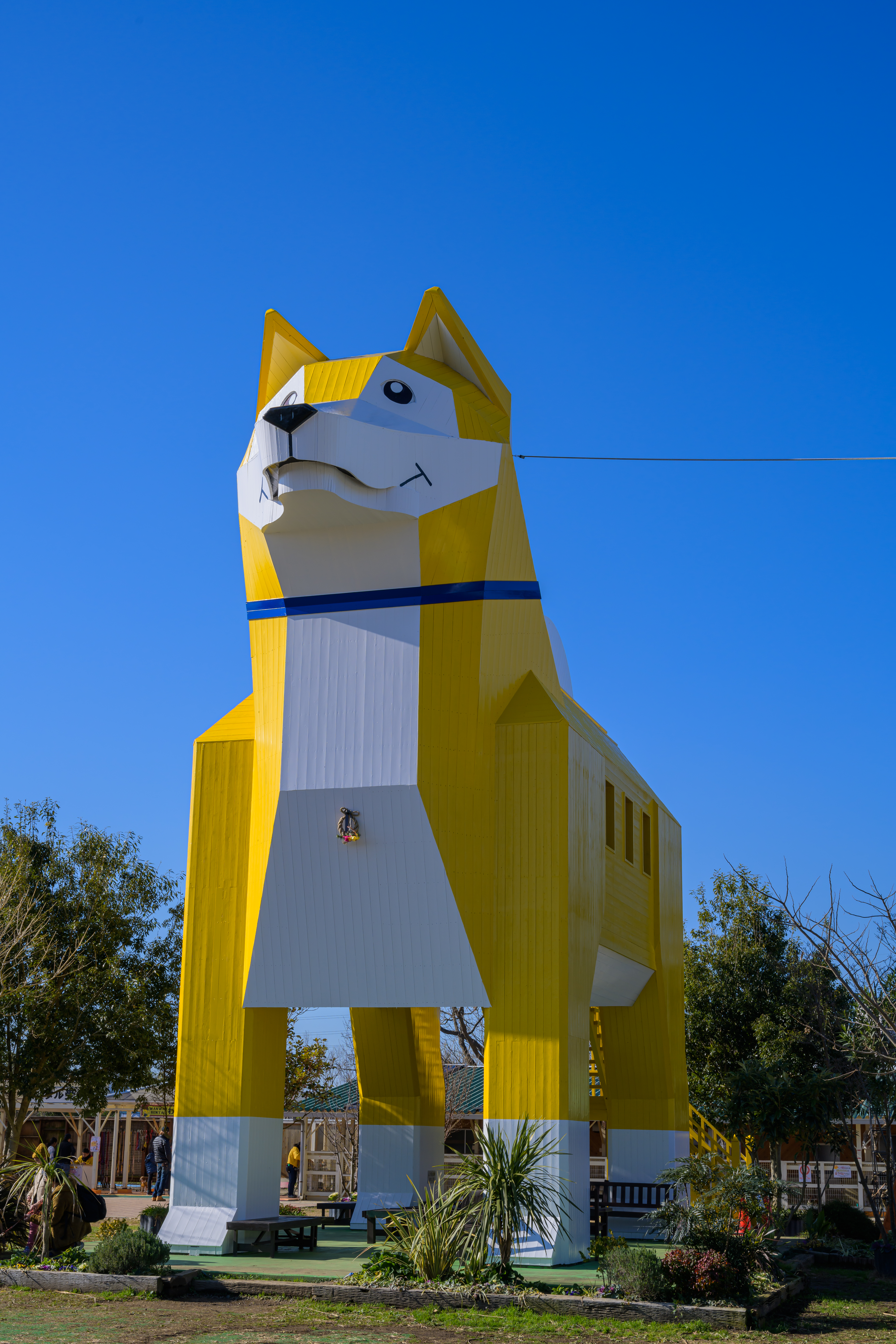 茨城県つくば市沼田のあるつくばわんわんランドの木造犬もっくん2020年版カラー